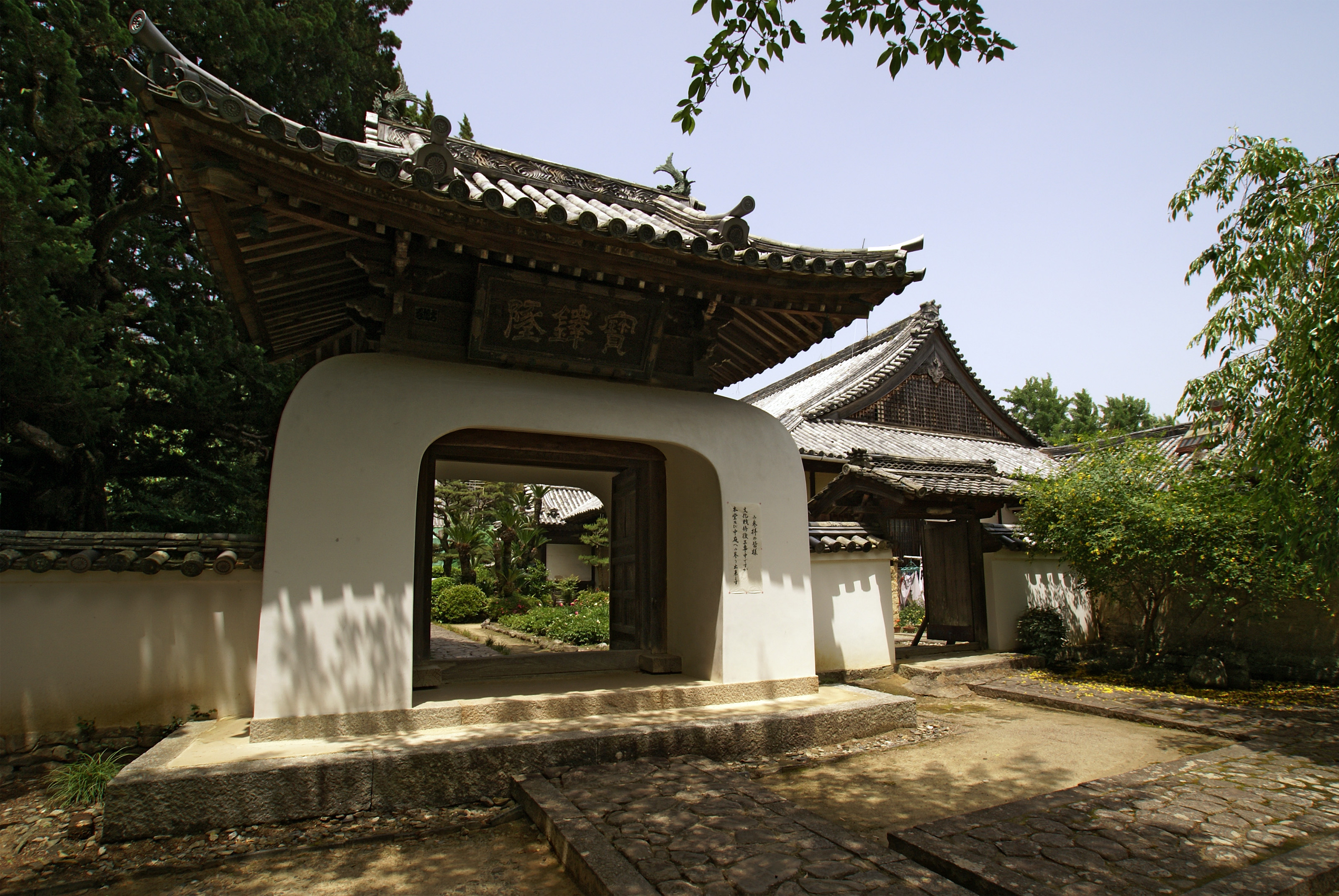 Juzenritsuin in Kinokawa, Wakayama prefecture, Japan